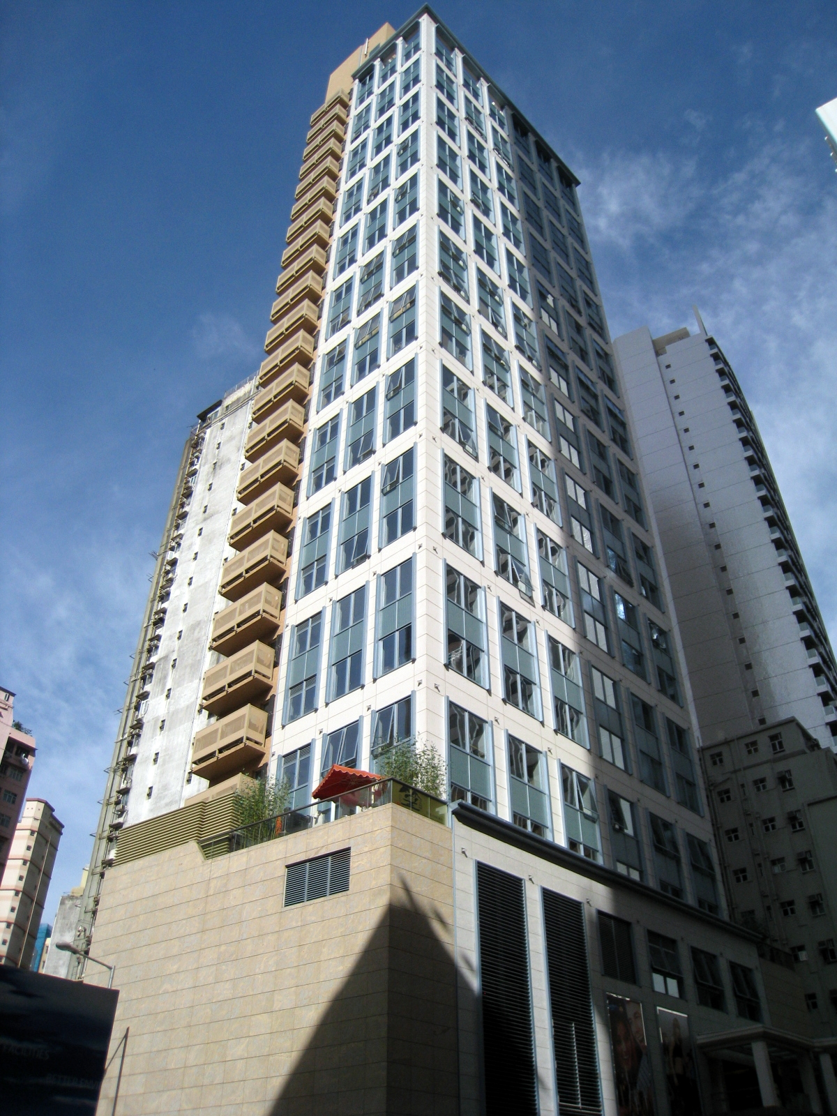 HK QRE Plaza